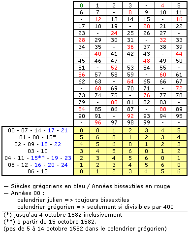 Calendrier perpétuel Moret. Tableau 1 : siècles et années